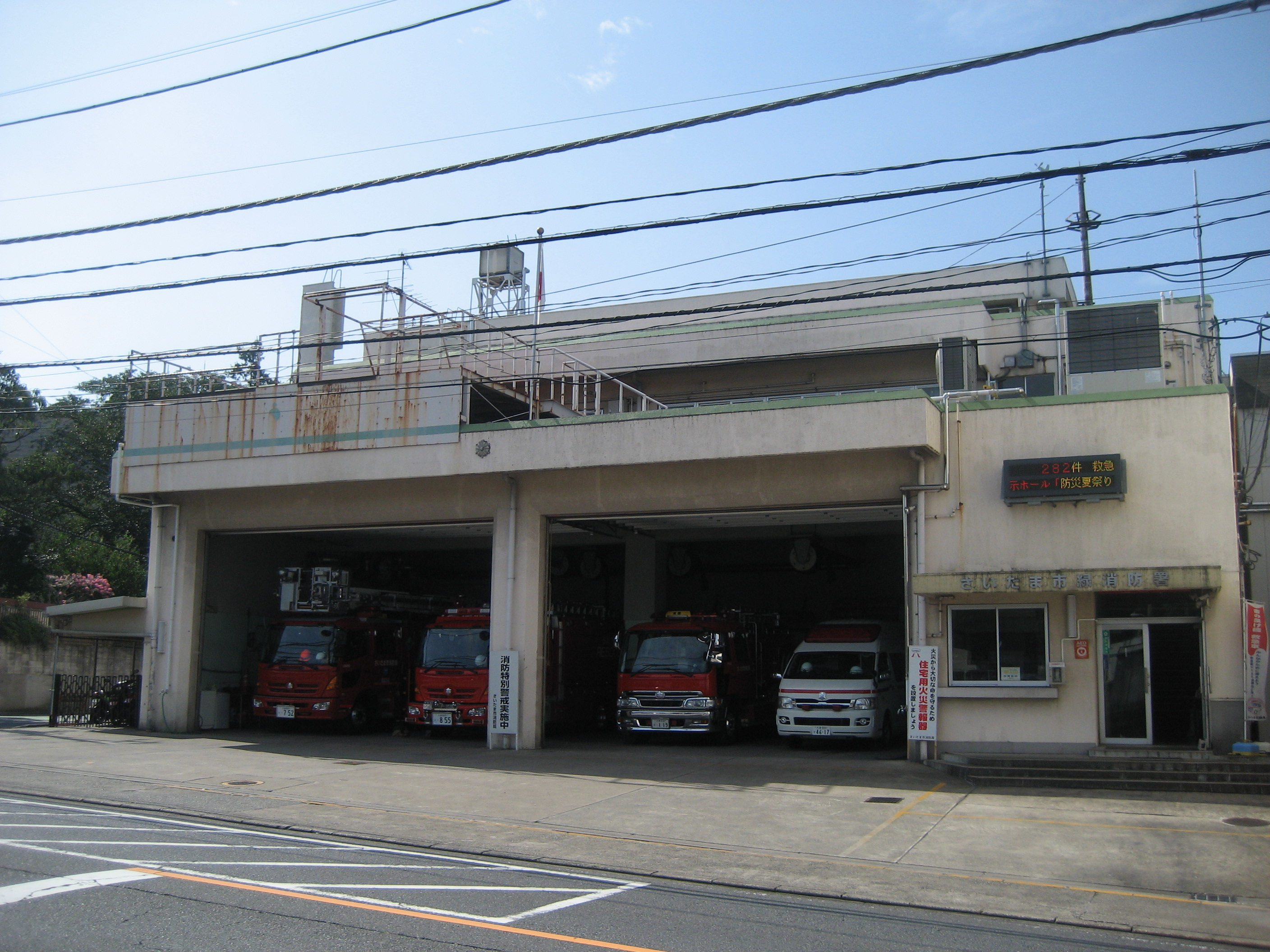 さいたま市消防局緑消防署